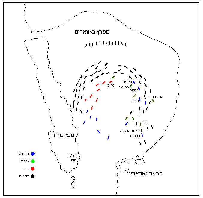 תרשים קרב נאווארינו, 20 באוקטובר 1827